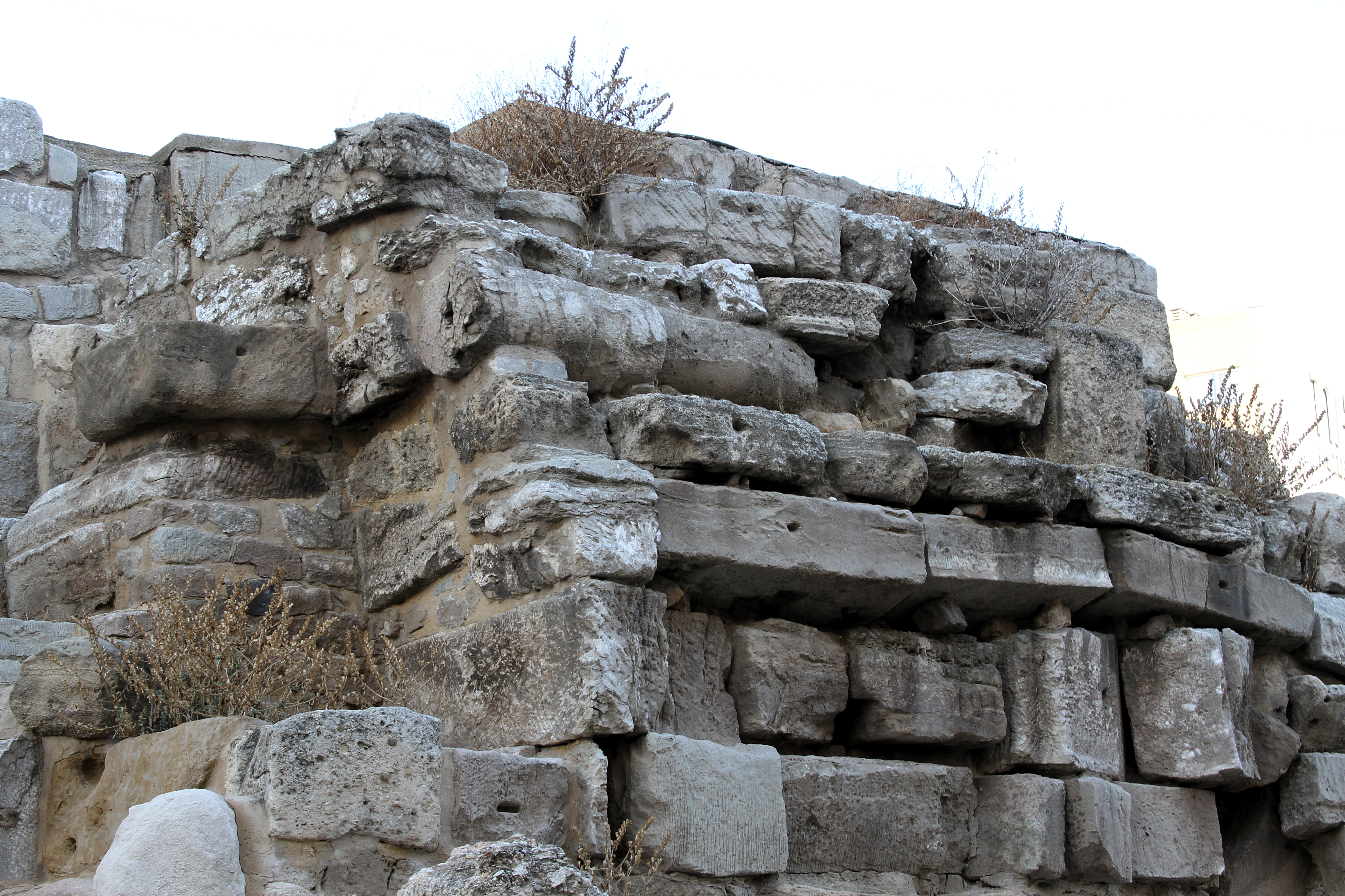 Muralla de Caesaraugusta (detalle de material reutilizado)